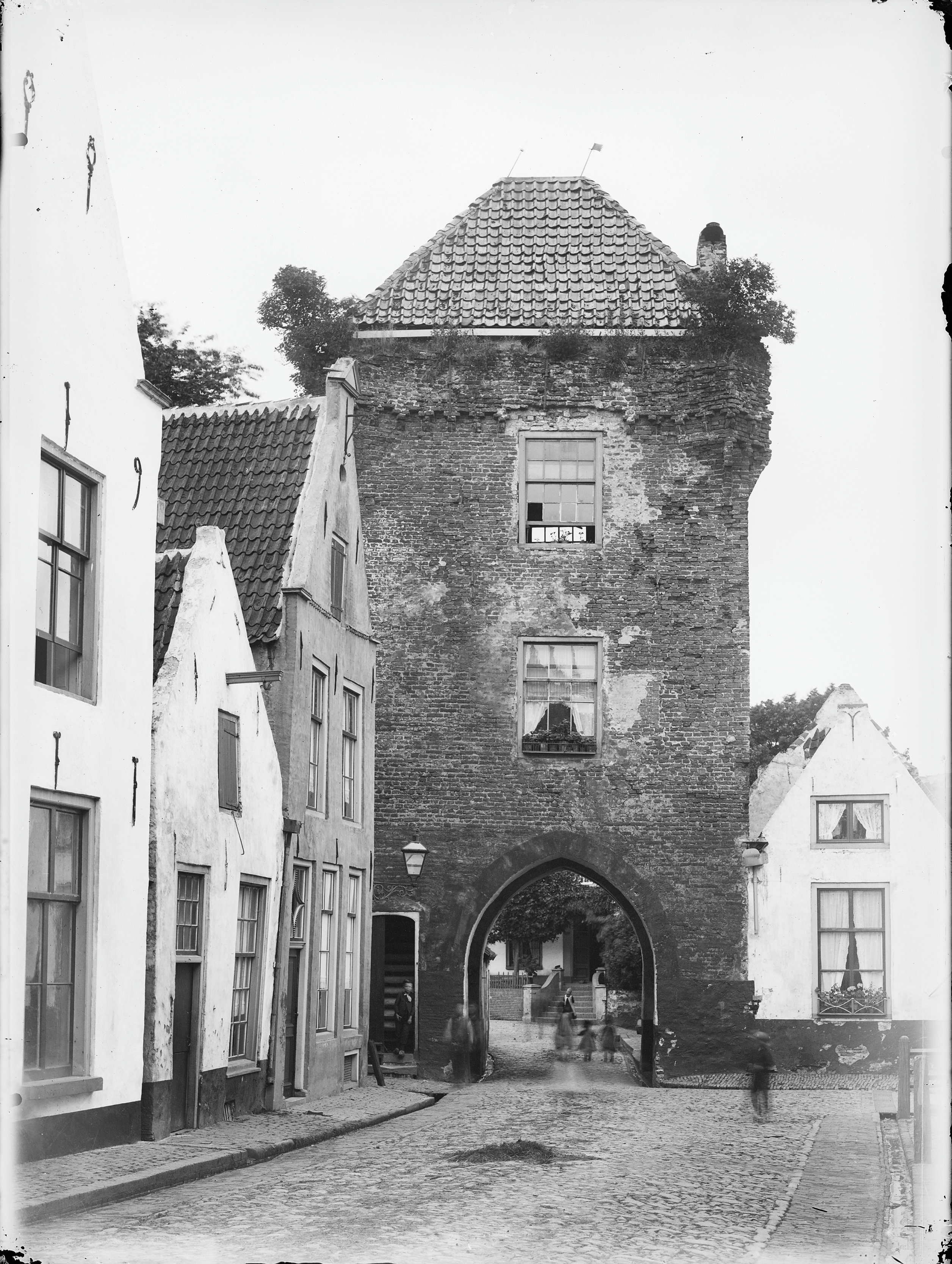 Poorten: Dijkpoort voor de restauratie